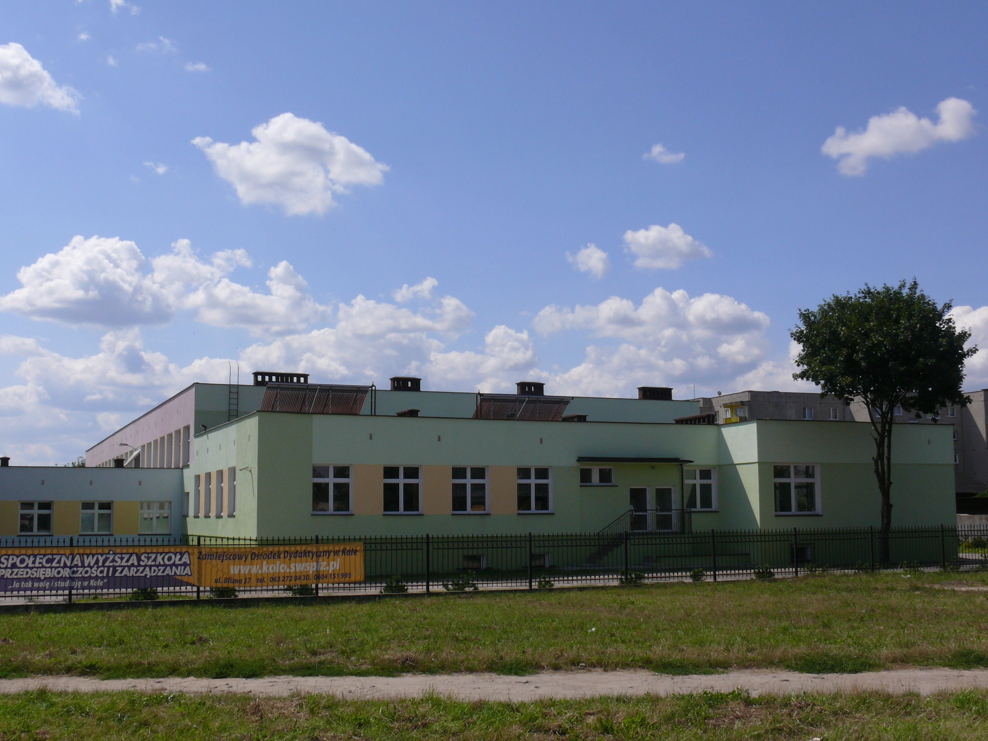 LO w Kole